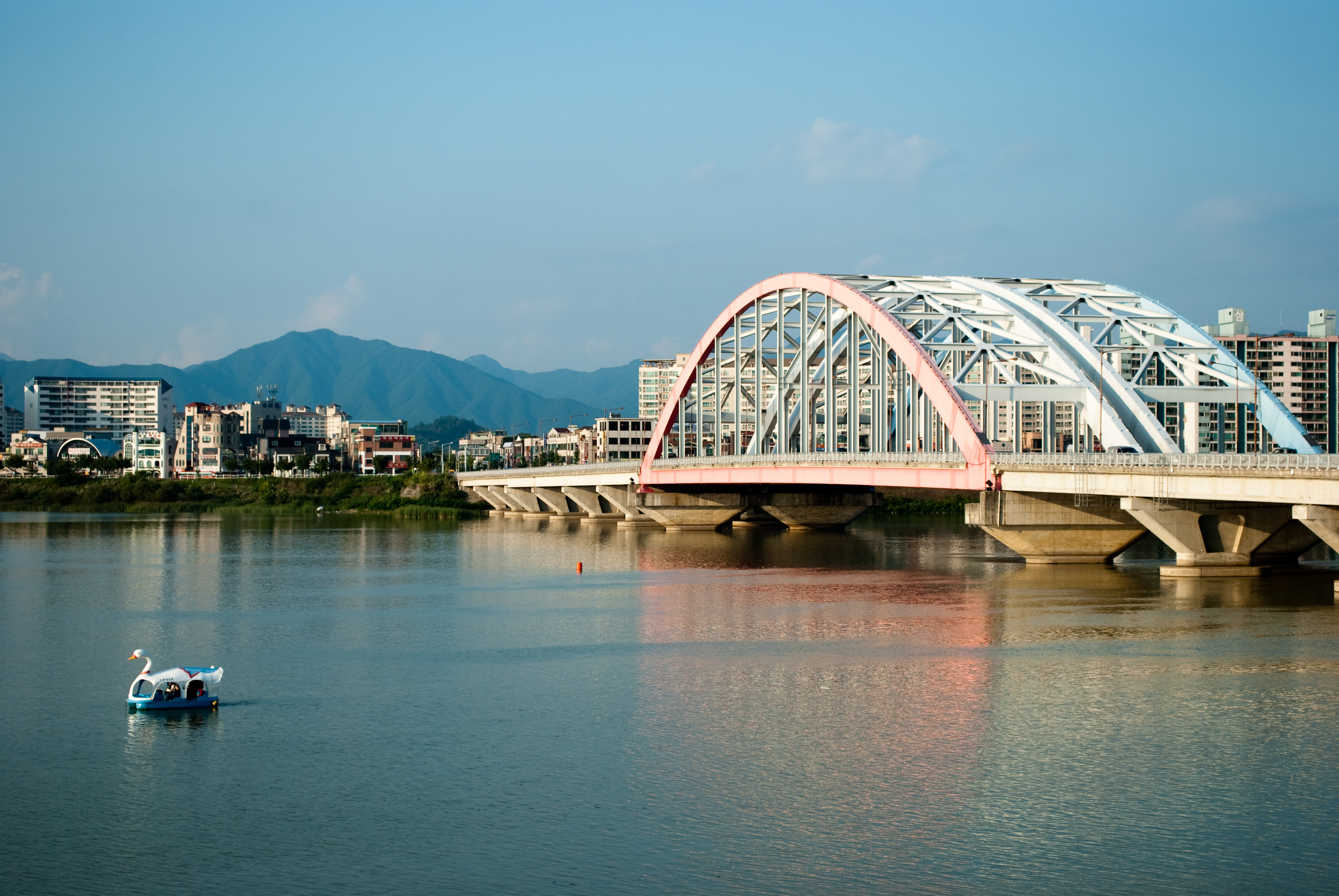 Chuncheon